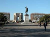 Photo personnelle prise à Montpellier - Noël 2005